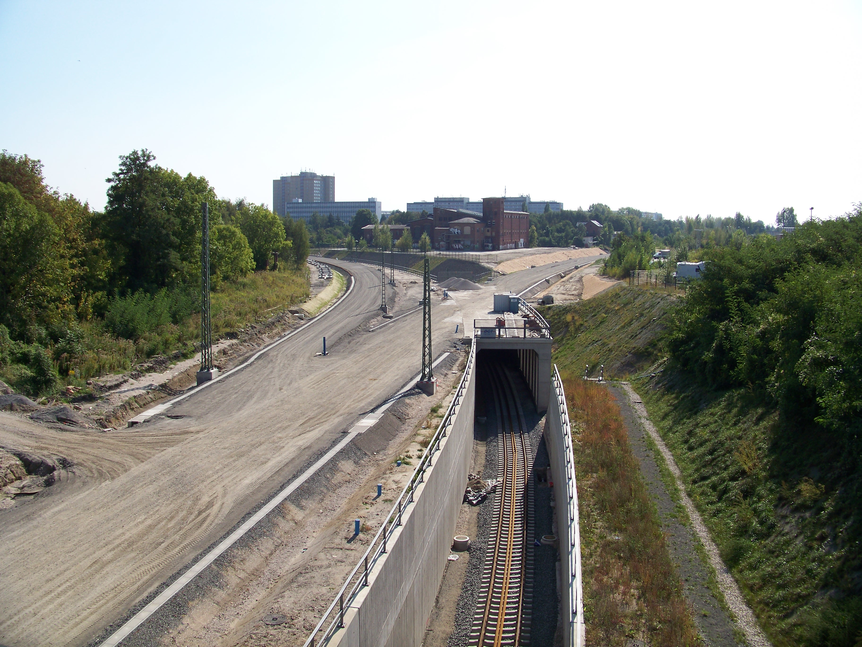 In Bau befindliches Überwerfungsbauwerk für den S-Bahnverkehr in Leipzig (Freigabe voraussichtlich Dezember 2012) auf Höhe der Richard-Lehmann-Straße in Leipzig-Südvorstadt; nach links wird die Strecke Richtung Leipzig-Stötteritz ausgefädelt, rechts geht die Strecke Richtung Leipzig-Connewitz ab